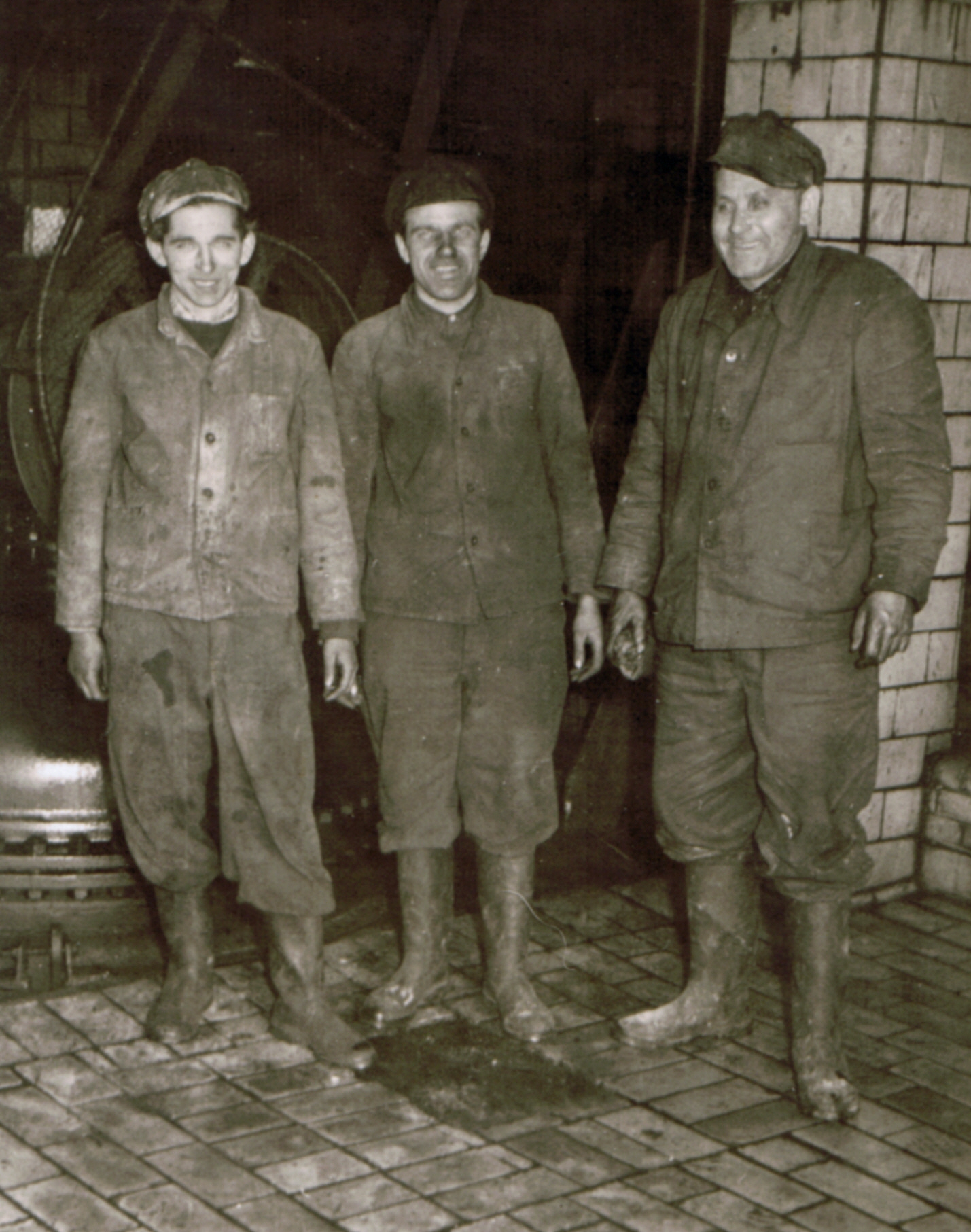 Die Belegschaft der Wela-Werke Uetersen (Maggi-Busch) im Jahr 1955